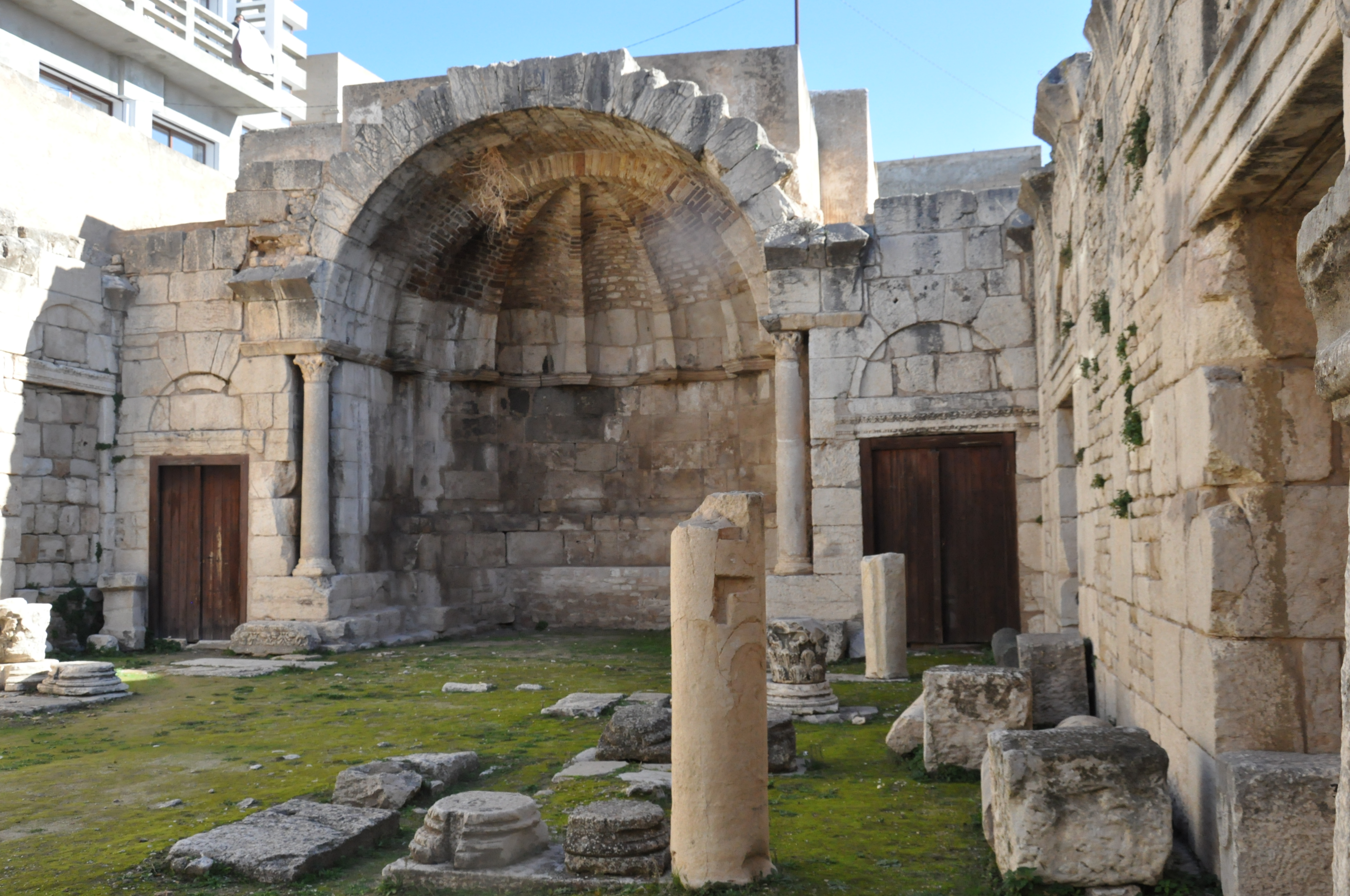 Église ancienne dite Dar El Kous